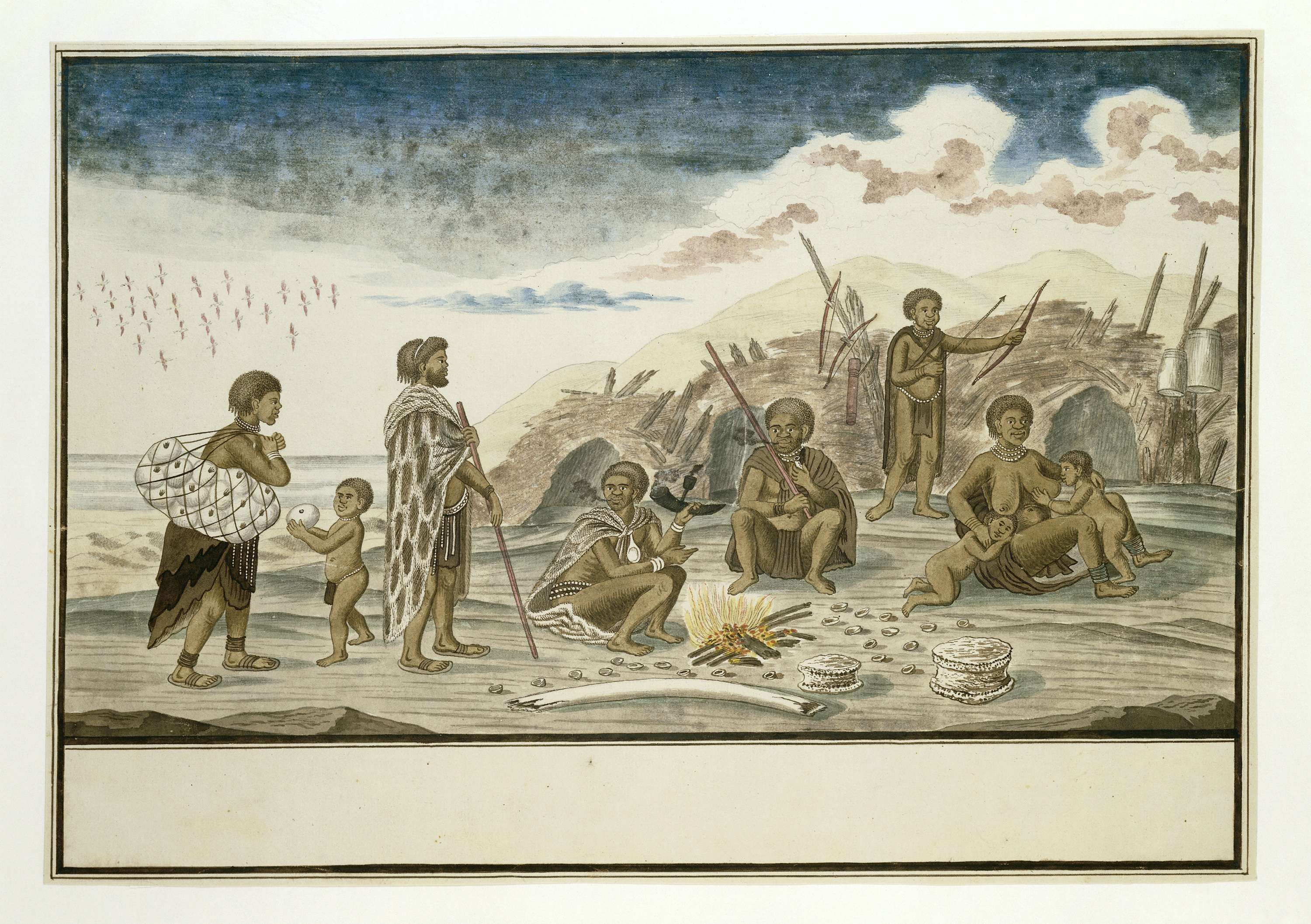 De Strandlopers en hun schuilhutten op het strand; een vlucht flamingo's op de achtergrond, walvisbeenderen en schelpen op de voorgrond. De Strandlopers is de benaming die Gordon aan deze Boesmanstam gaf.; Iconclasscode: 25F37(FLAMINGO); ; drawing; albumblad